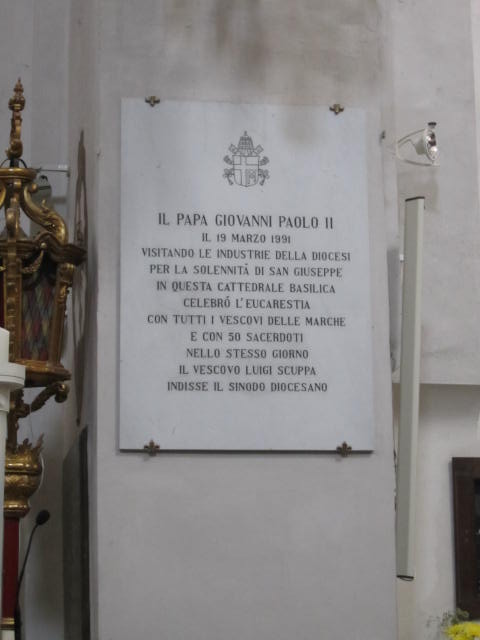 Lapide che ricorda la visita di papa Giovanni Paolo II